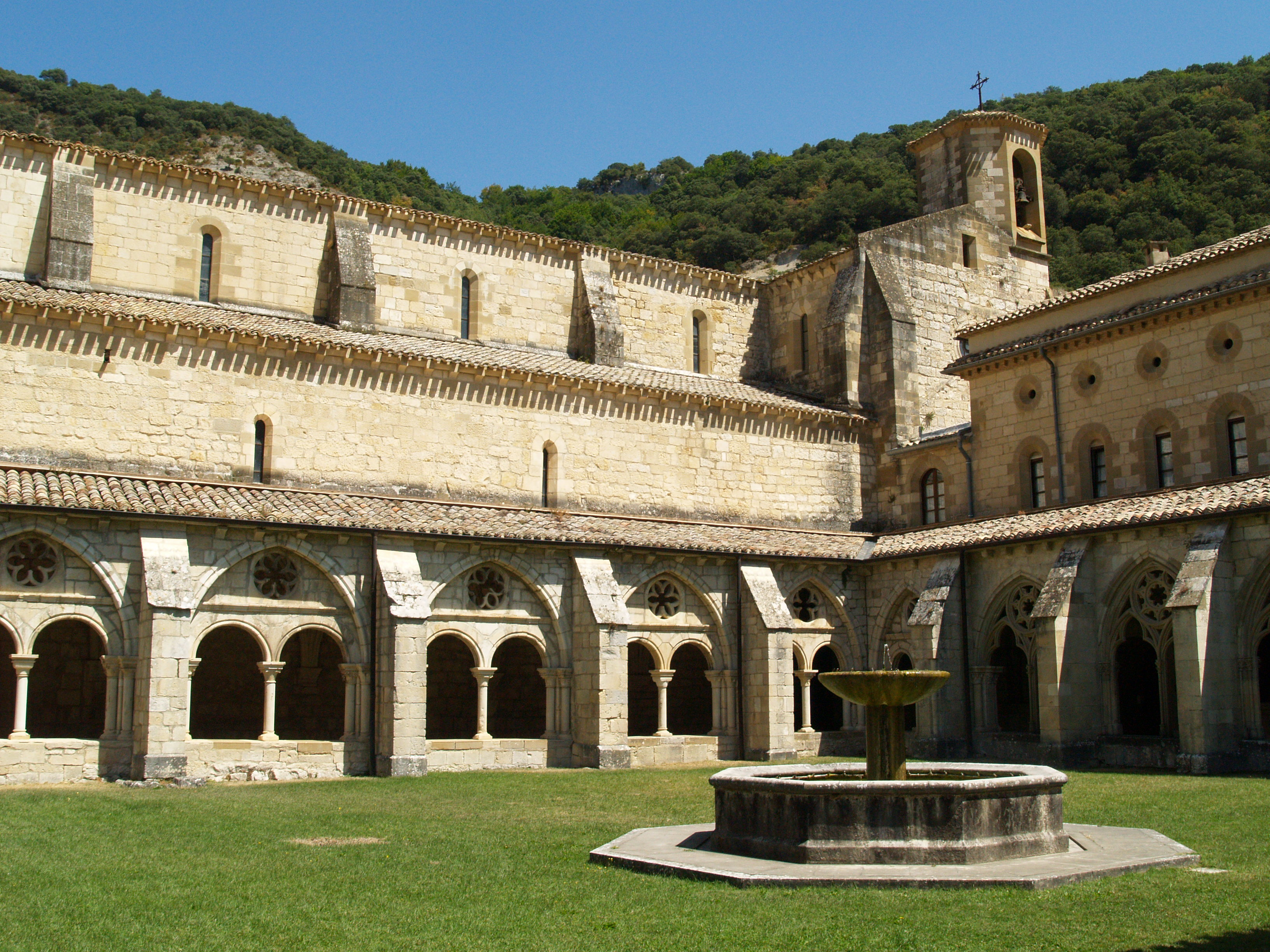 Monestir de Santa Maria d'Iranzu - Claustre S.XIII-XIV